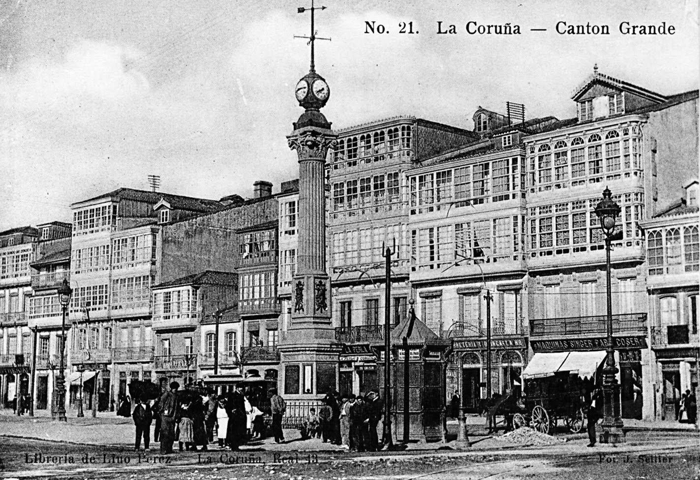 O Cantón Grande da Coruña a comezos do século XX.